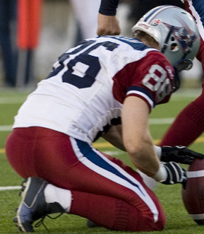 Field Goal Attempt - Tentative de placement